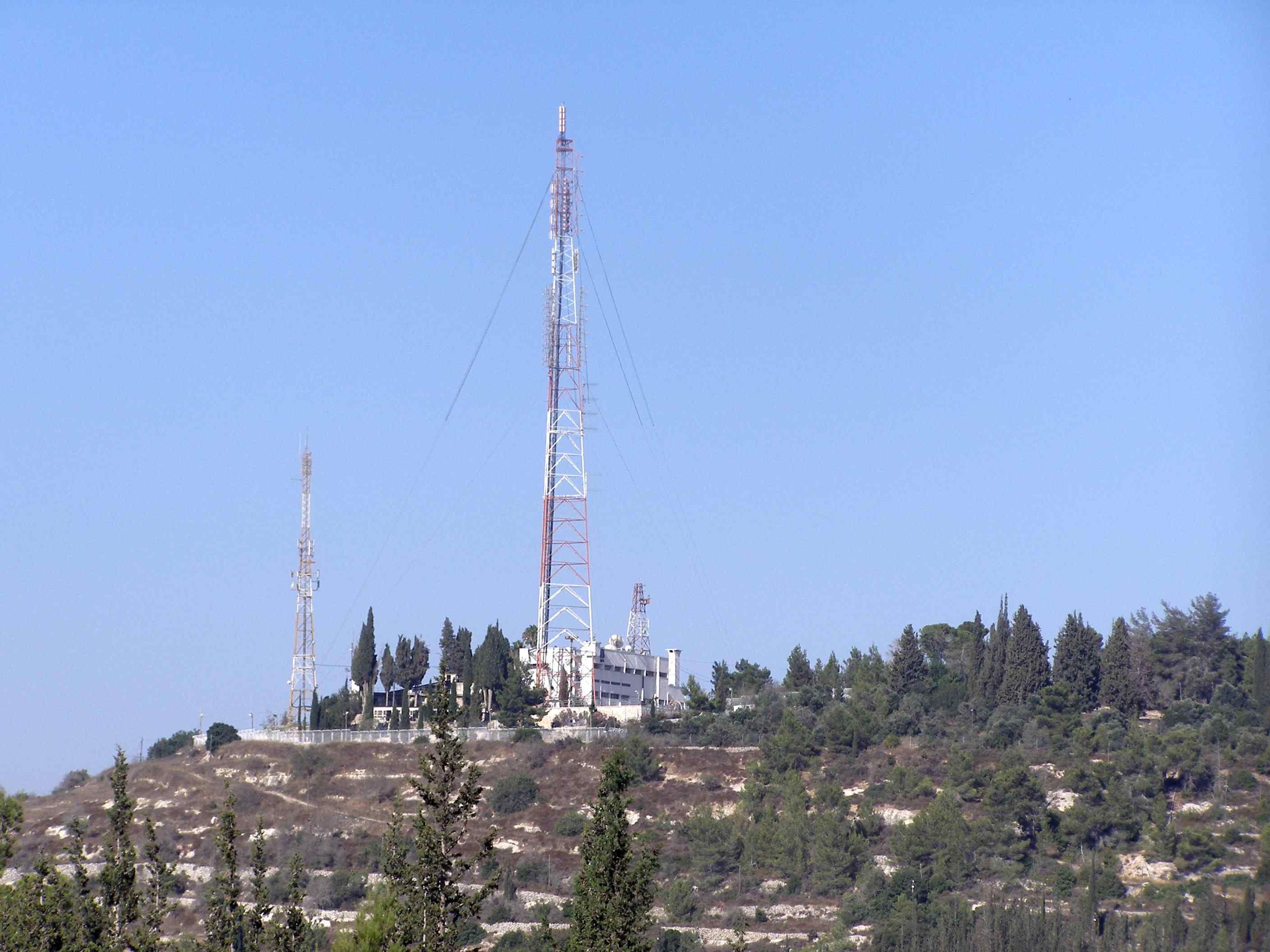 Eitanim mountain, in Jerusalem mountains, Israel